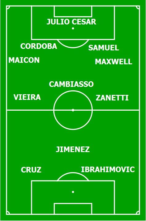 formazione titolare dell'Inter 2007-2008